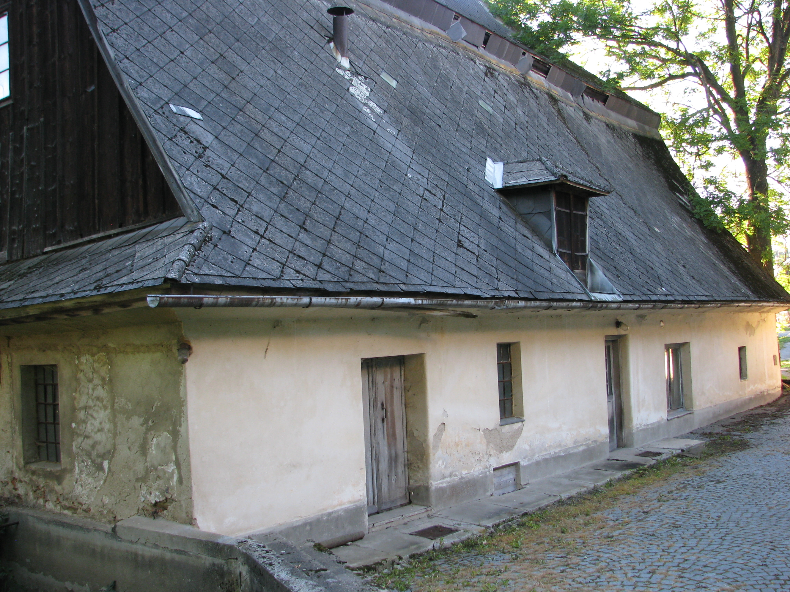 Vodní mlýn (Petrovice), Petrovice 16